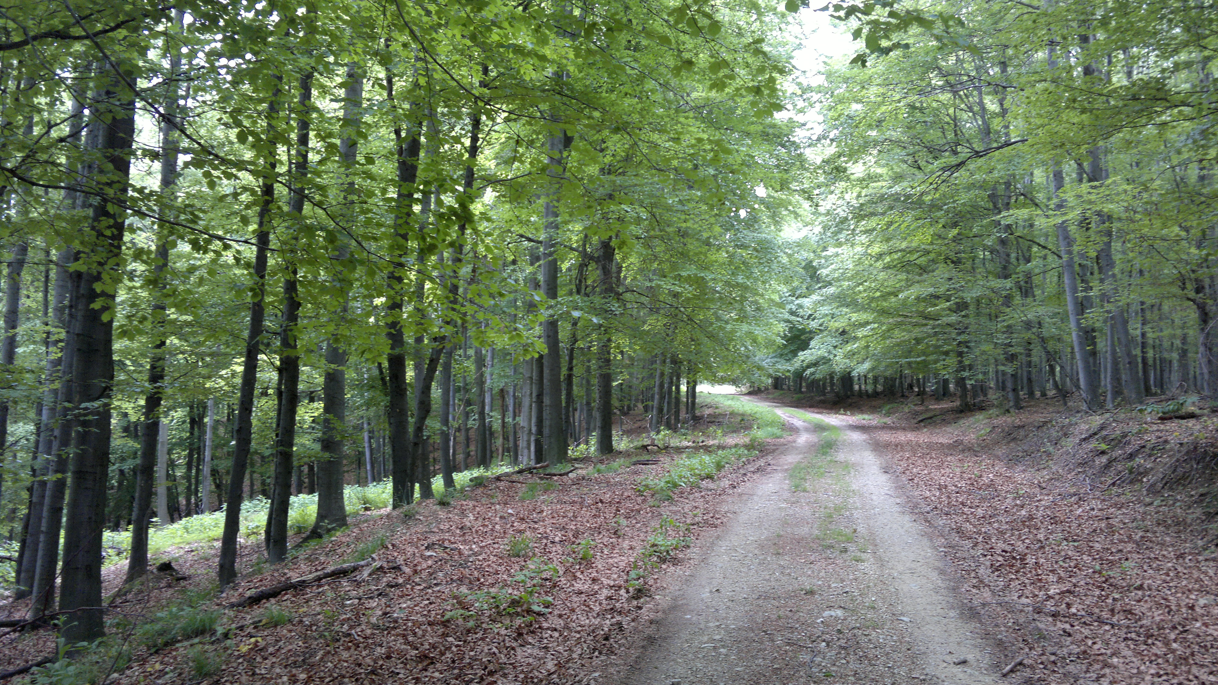 Gazije, Croatia